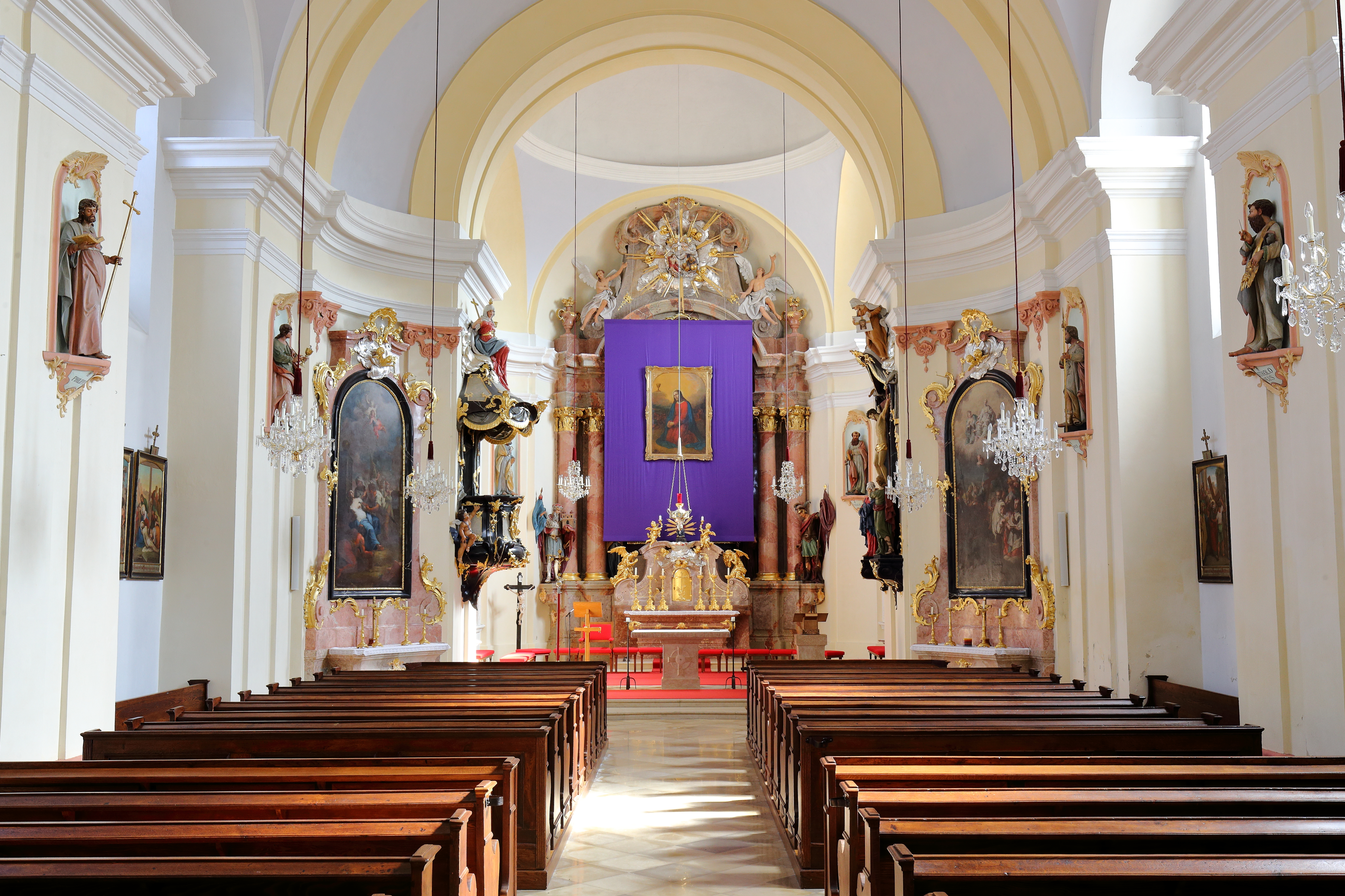 Innenansicht der katholischen Pfarrkirche hll. Barbara und Agatha in der niederösterreichischen Marktgemeinde Bad Pirawarth.